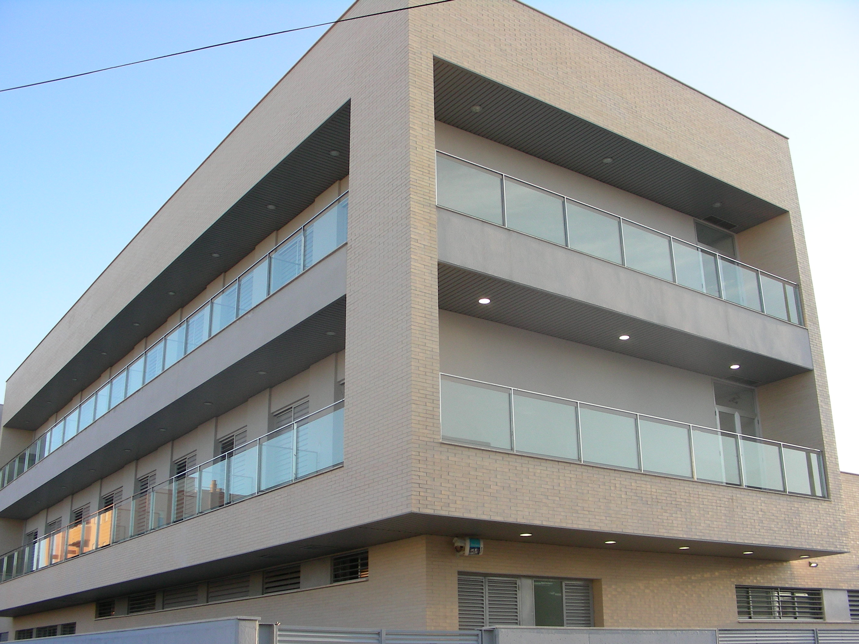 Residencia de estudiantes del instituto Nacional de la Marina de Isla Cristina